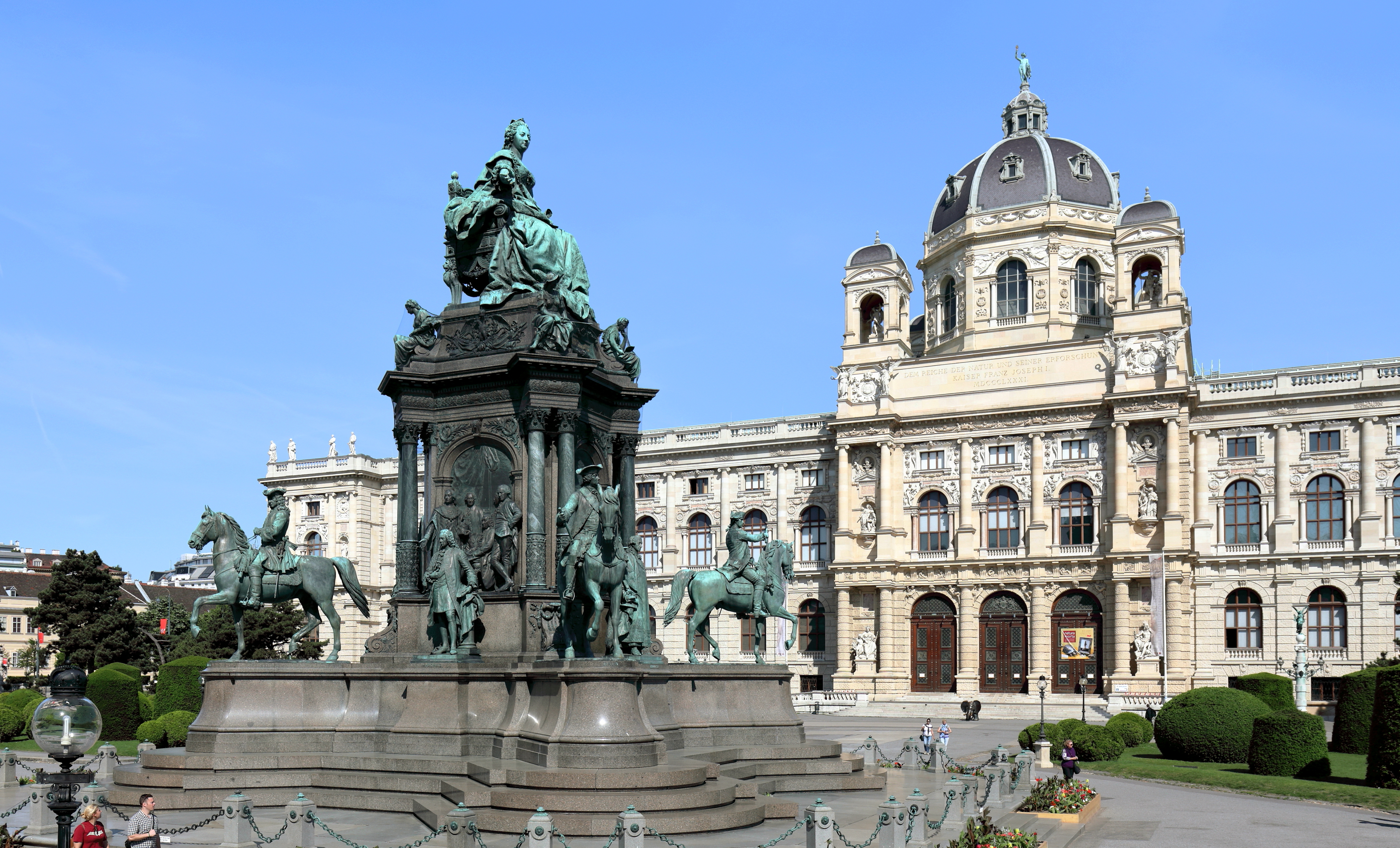 Der Maria-Theresien-Platz im 1. Wiener Gemeindebezirk Innere Stadt.Im Vordergrund das Maria-Theresien-Denkmal. Das imposanteste Werk der neueren plastischen Kunst in Wien wurde in 13 Jahren (Modell 1874, Vollendung 1887) von Caspar von Zumbusch (Plastiken) und Carl von Hasenauer (Bauwerk) geschaffen und am 13. Mai 1888, dem Geburtstag der Herrscherin, enthüllt. Im Hintergrund das Naturhistorisches Museum. Nach Entwürfen von Gottfried Semper und Karl Freiherr von Hasenauer an der 1865 eröffneten Wiener Ringstraße gegenüber der kaiserlichen Hofburg im Stil des Wiener Historismus errichtet und am 10. August 1889 eröffnet.